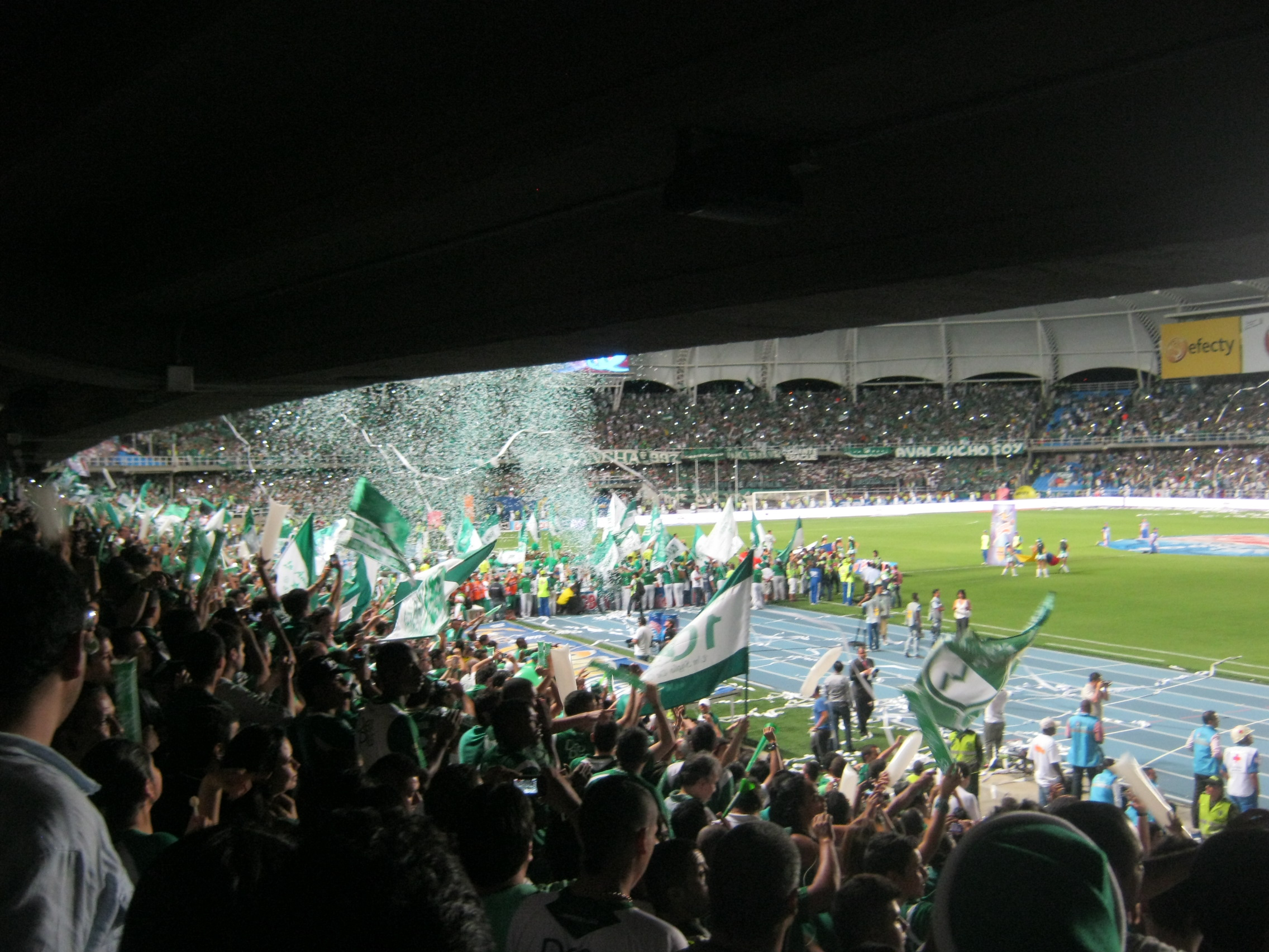 Primer encuentro de la final de la Liga Postobón 2013-II entre Deportivo Cali y nacional